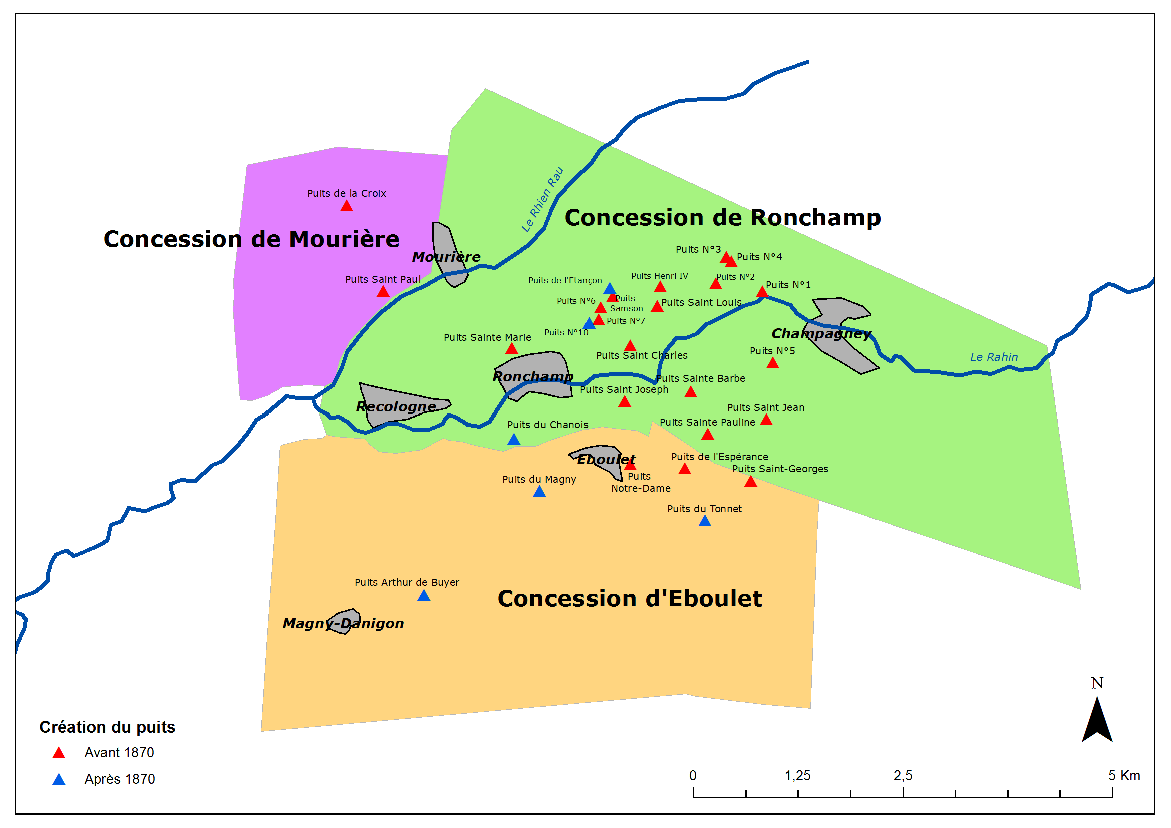 Les concessions Houillères de Ronchamp.